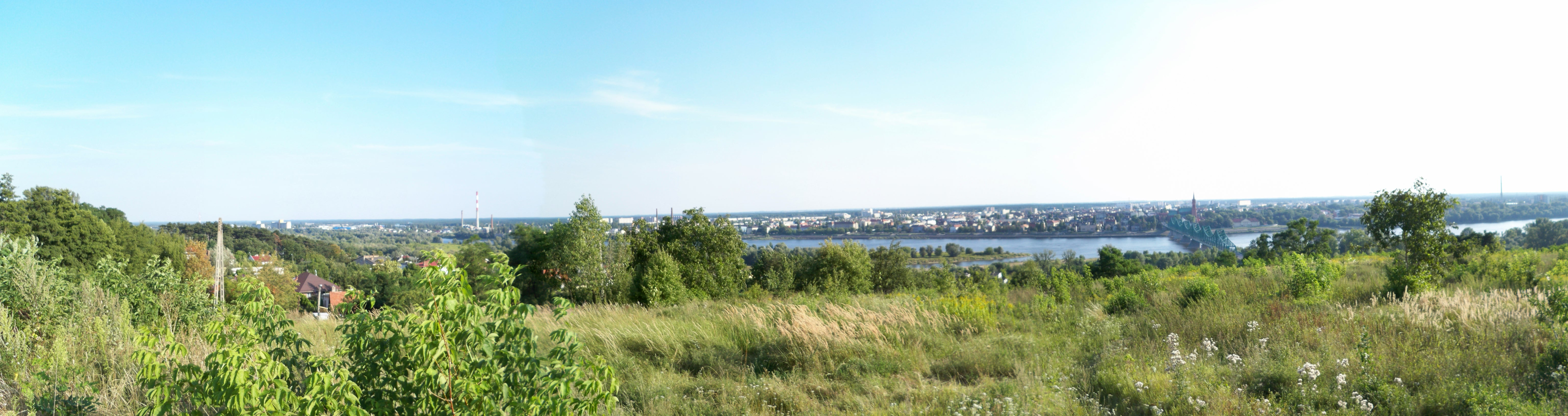 Widok ze Wzgórz Szpetalskich (2009 r.)